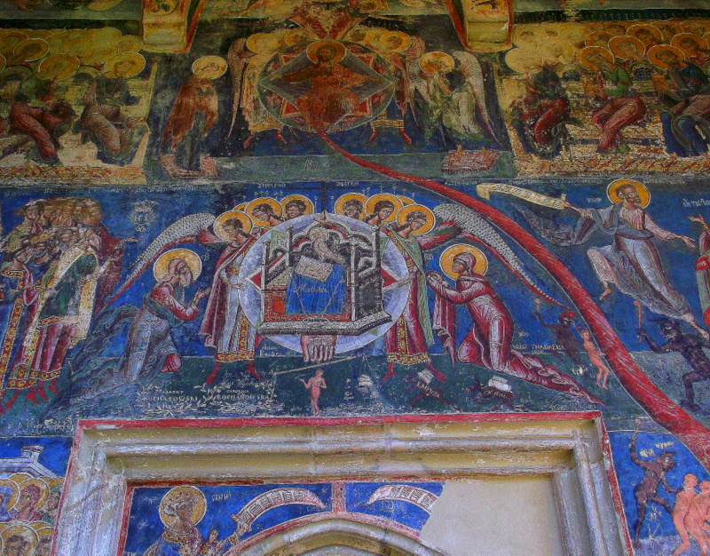 Watra Mołdowica (Vatra Moldoviţei), cerkiew - fragment fresku